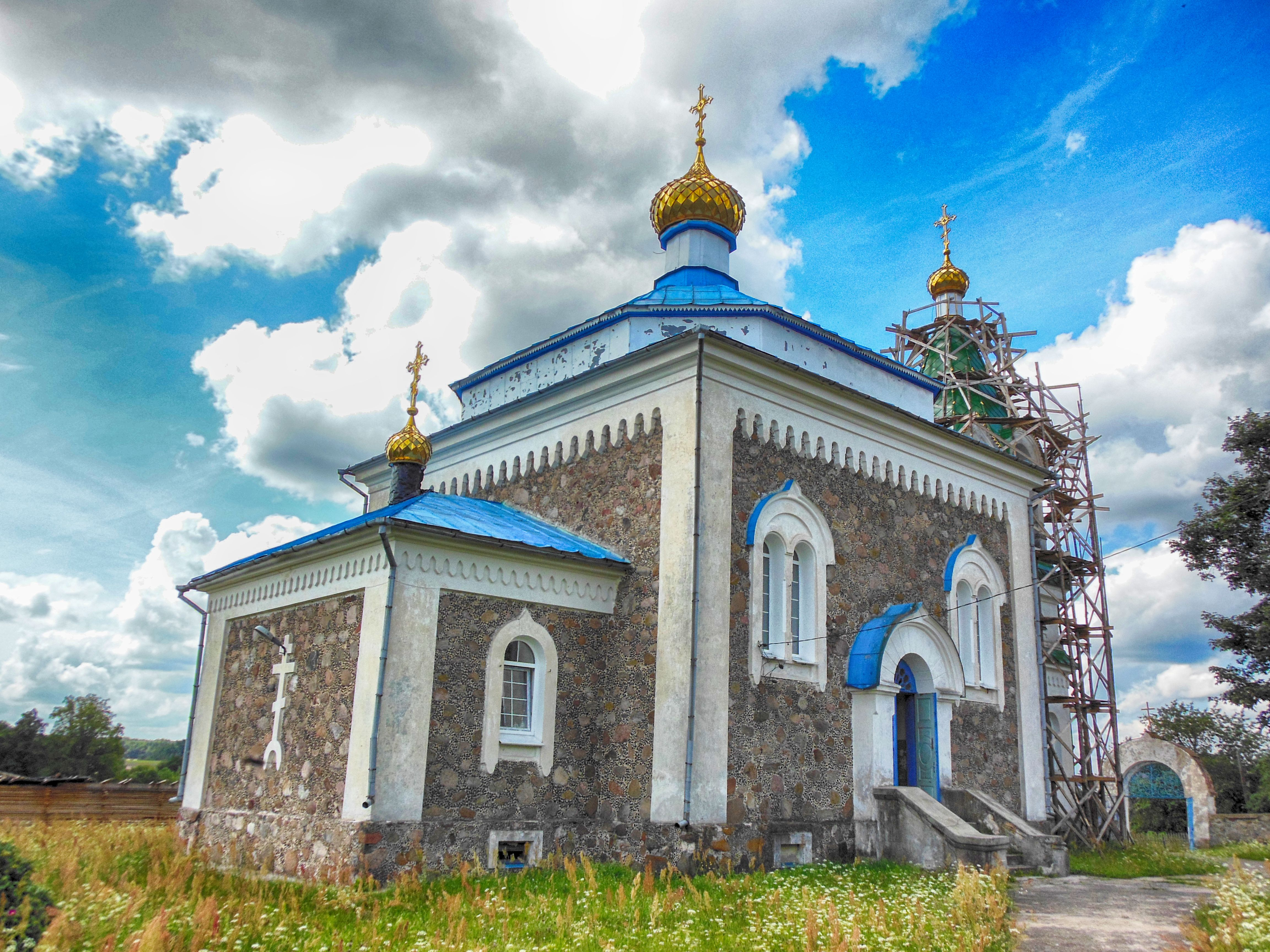 Беларуская (тарашкевіца): Царква сьвятых Касмы і Даміяна ў Вішнева (Валожынскі раён)